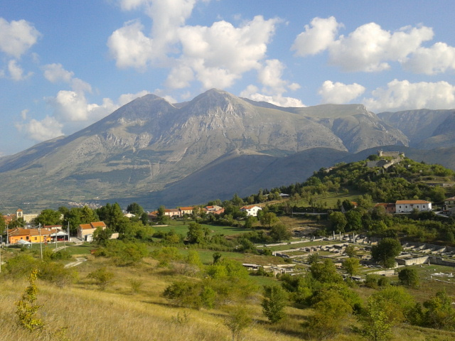 Il monte Velino visto da Alba Fucens